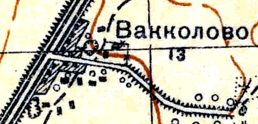 Топографическая карта Ленинградской области, квадрат О-36-13-А-в (Красногвардейск), деревня Вакколово